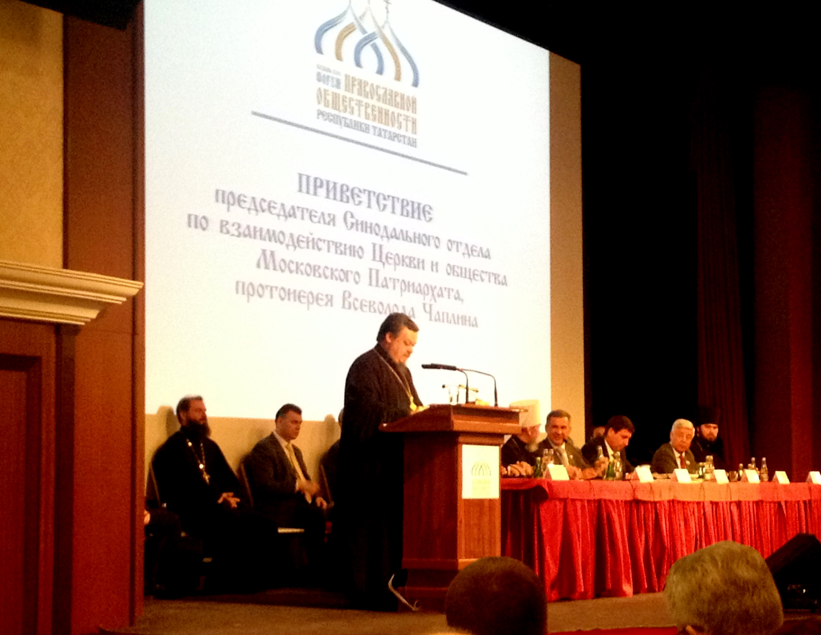 Выступление председателя Синодального отдела по взаимодействию Церкви и общества Московского патриархата, протоирея В А. Чаплина на I Форуме православной общественности Республики Татарстан.